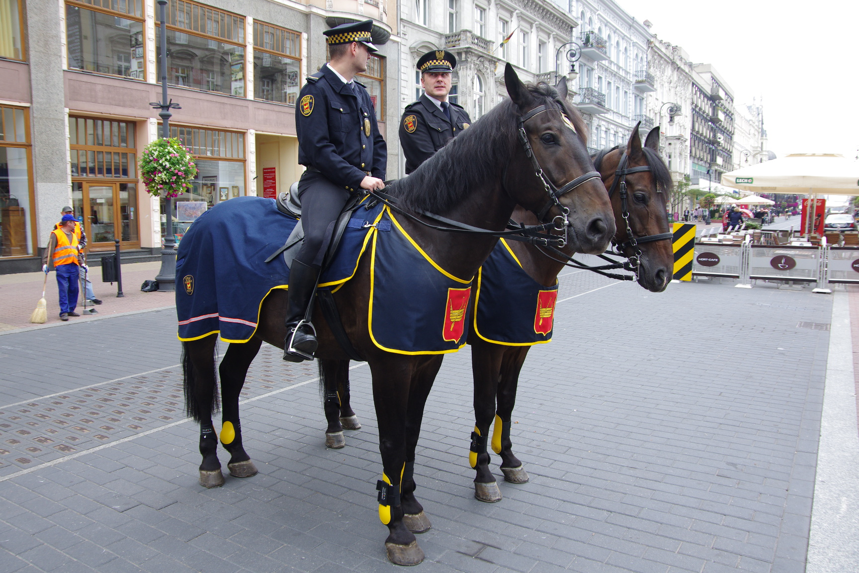 Patrol straży miejskiej w Łodzi sekcja konna na ulicy Piotrkowskiej